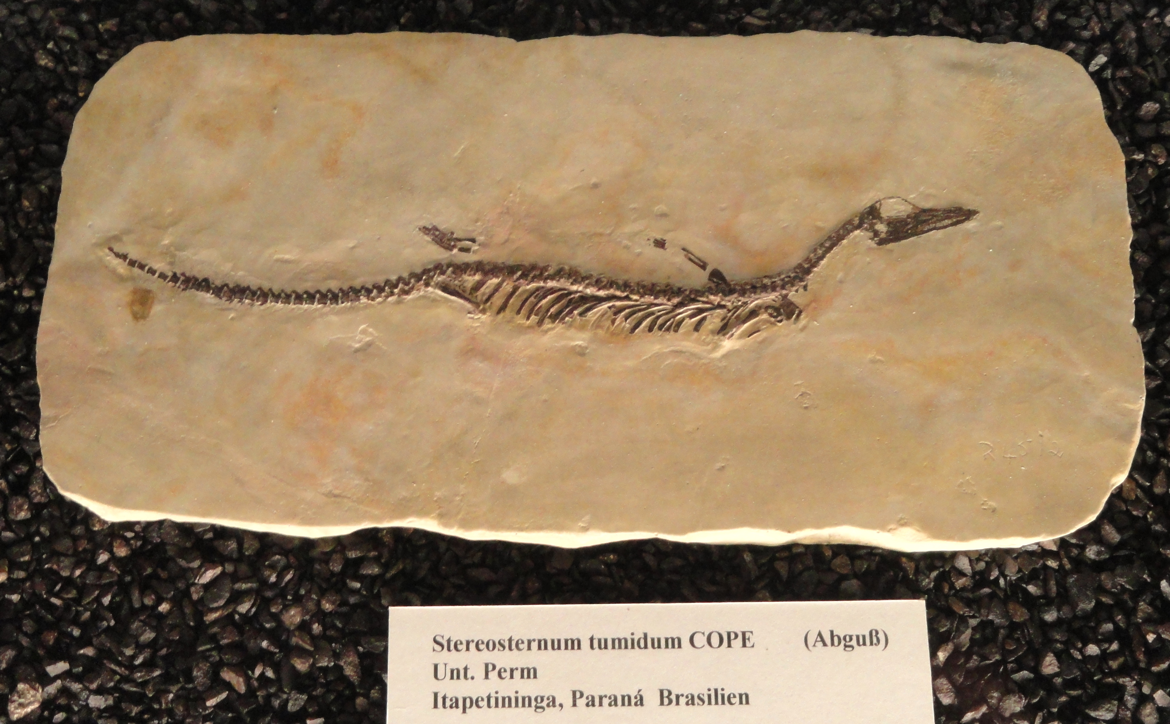 Exhibit in Naturmuseum Senckenberg, Frankfurt am Main, Germany.